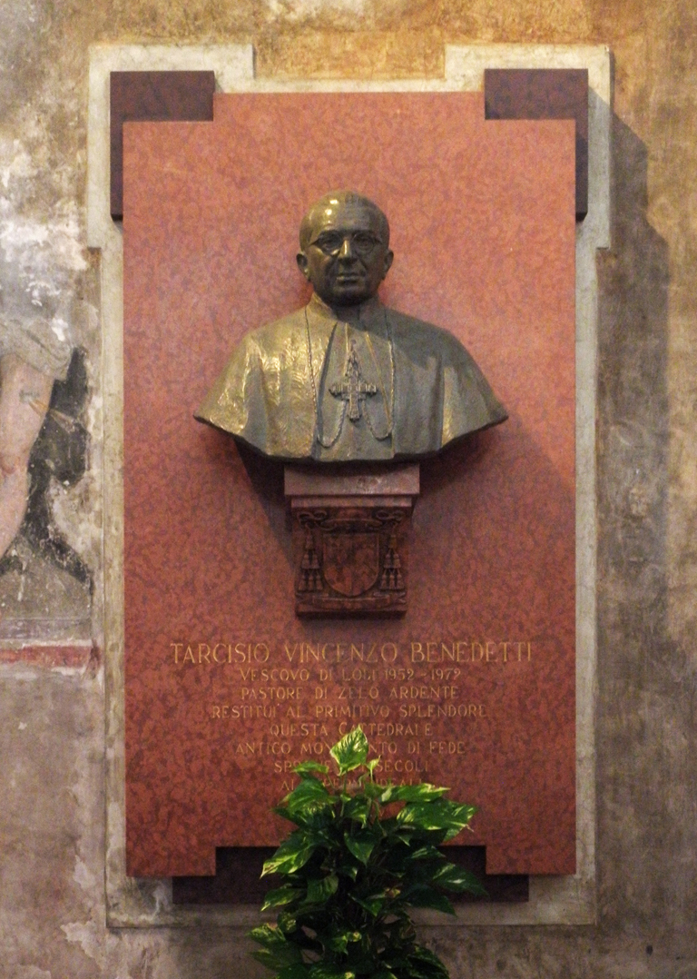 Busto e lapide dedicati al vescovo Tarcisio Vincenzo Benedetti, all'interno della Cattedrale di Lodi